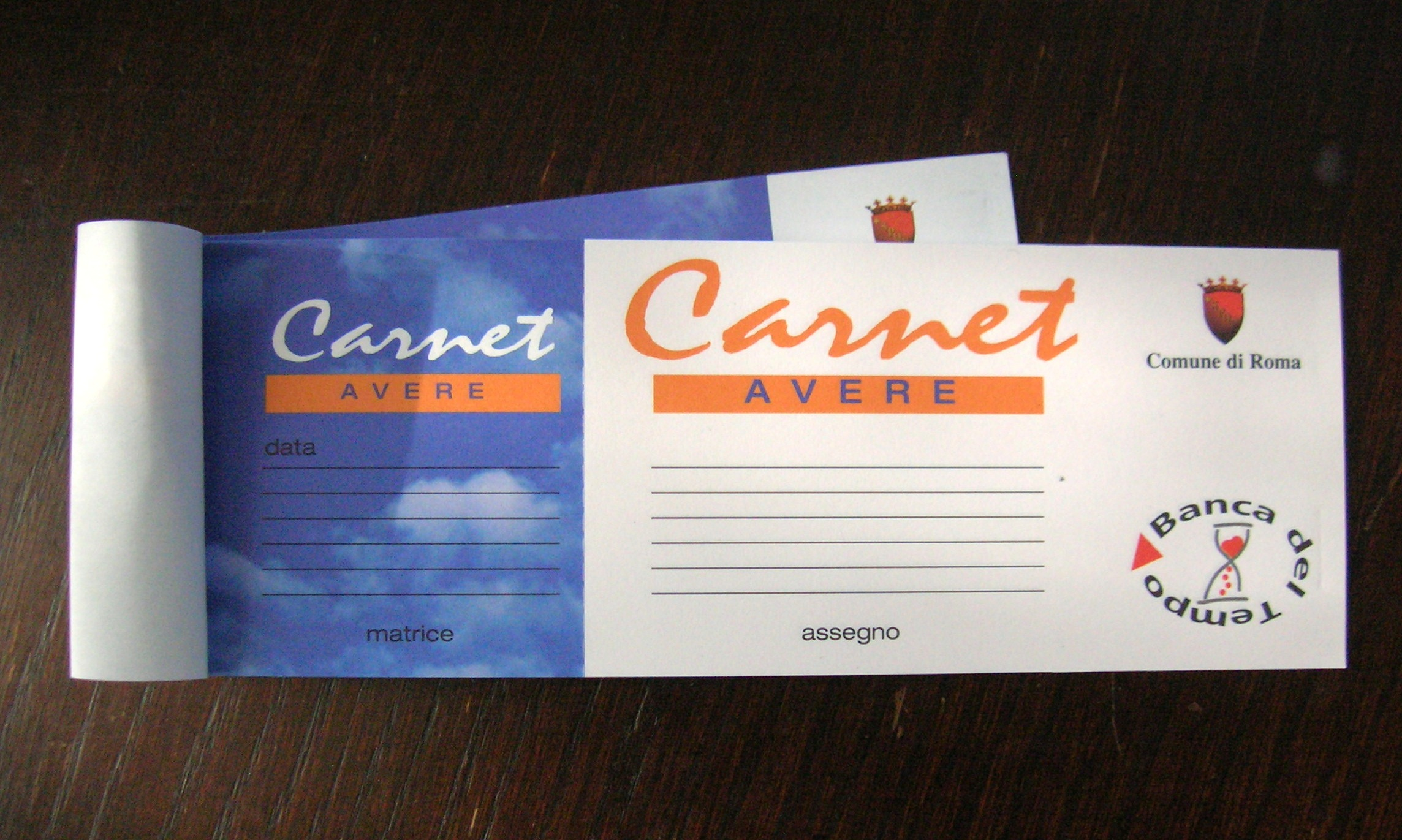 Carnet della Banca del Tempo di Roma, Italia, con le ore da dare e da avere in cambio.